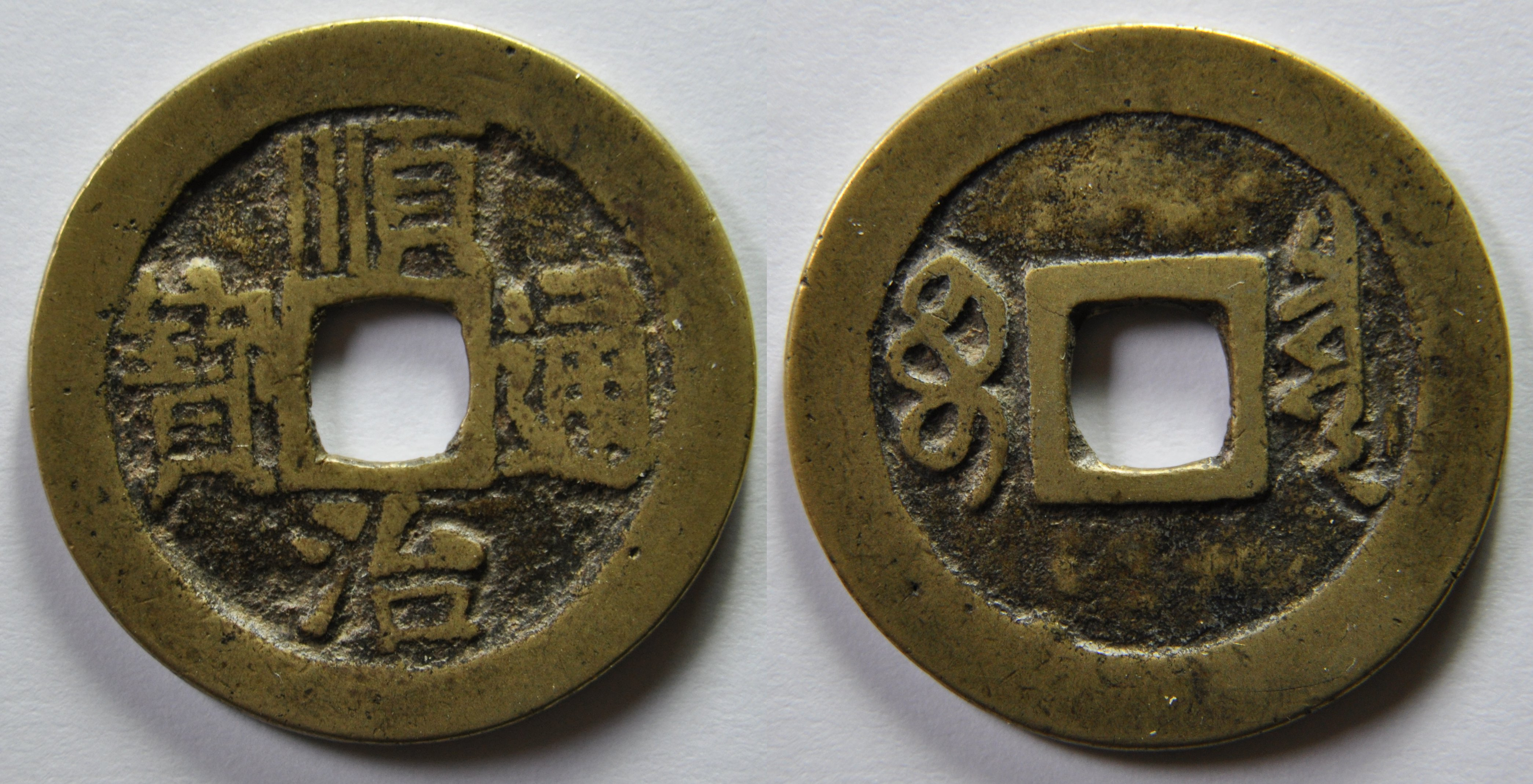 Une monnaie en laiton d'une sapèque (1 cash) de l'empereur Shi Zu (1644-1661), ère Shun Zhi de la dynastie Qing (1644-1912) pour l'atelier du ministère des finances à Pékin. La monnaie se lit en croix. A/ Shun Zhi tong bao (Monnaie courante de Shun Zhi) R/ Boo chiowan en mandchou Dimension : 27,4 mm Poids : 4,6 g. Remarque : En 1657, le poids est augmenté à 1,4 qian (ca 5,2 g.) et le nom de l'atelier est rajouté en mandchou au revers. Il s'agit d'un bel exemplaire mais ne correspondant pas à la norme car elle est trop légère. Cette monnaie a été émise entre 1657 et 1661. La composition est de 70% de cuivre et 30% de zinc sous le règne de cet empereur. Référence : H22.70 Indice de rareté : 15, très commune d'après D.Hartill.